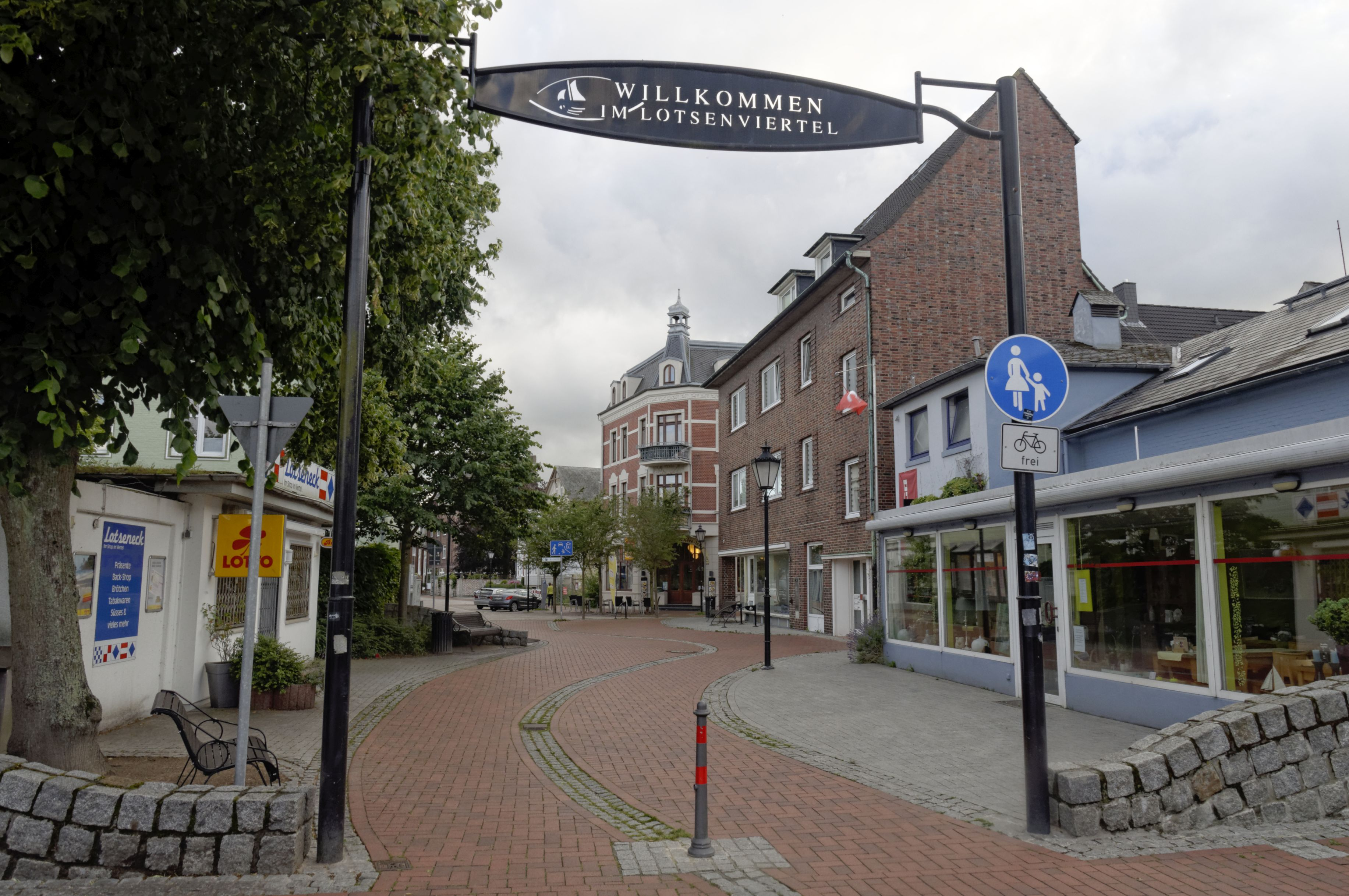 Bilder aus Cuxhaven 2017